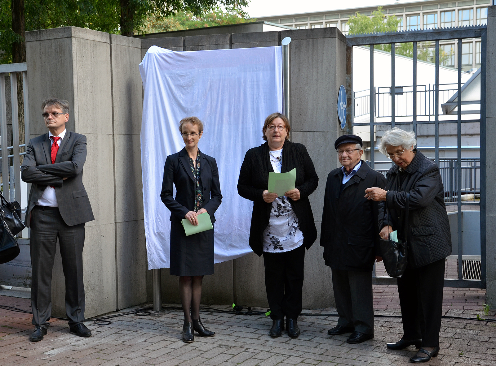 An der Stelle der ehemaligen Neuen Synagoge in Hannover, die durch die Nationalsozialisten zerstört wurde (in der Nacht vom 9. auf den 10. November 1938, der sogenannten Reichspogromnacht), wurde am 15. September 2013 eine ausführlichere Informationstafel enthüllt. Die Enthüllung wurde von den beiden Holocaust-Überlebenden Ruth Gröne und Henry Korman vorgenommen, außerdem von der Präsidentin des Landeskirchenamts Hannover, Stephanie Springer, sowie Hannovers Kultur- und Schuldezernentin Marlis Drevermann im Beisein zahlreicher Gäste aus Politik, Kultur und Vertretern verschiedener Glaubensrichtungen. Für die Vorbereitungen zeichnete nicht nur das Netzwerk Erinnerung und Zukunft verantwortlich; auch SchülerInnen der Heisterbergschule aus Ahlem hatten die Veranstaltung mitgestaltet. Die Gedenktafel in der Straße Rote Reihe der Calenberger Neustadt dokumentiert seitdem in Wort und Bild die Geschichte der Neuen Synagoge an ihrem ehemaligen Standort ...